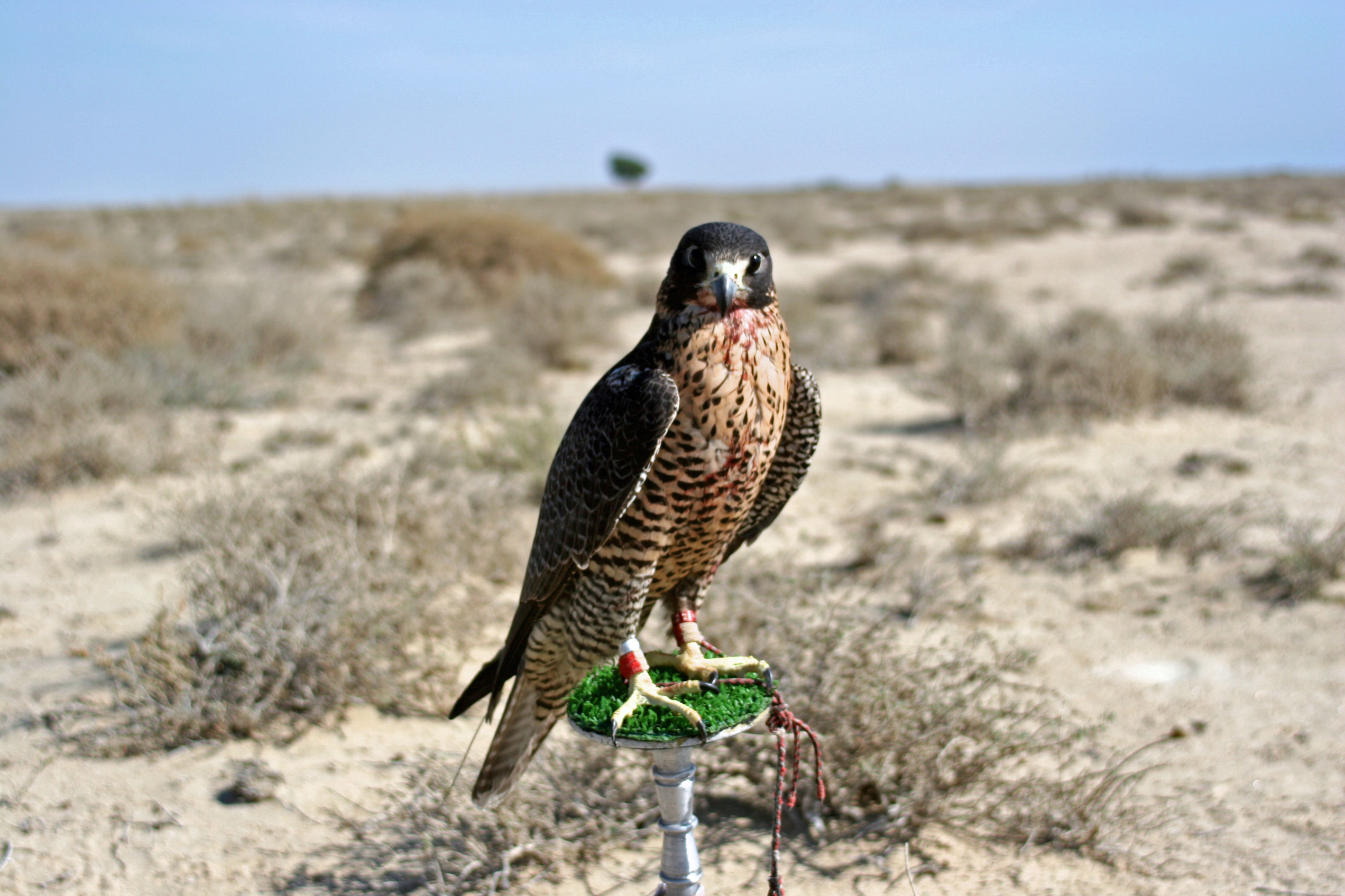 صقر جير شاهين في باكستان أثناء رحلة صيد بالصقور.